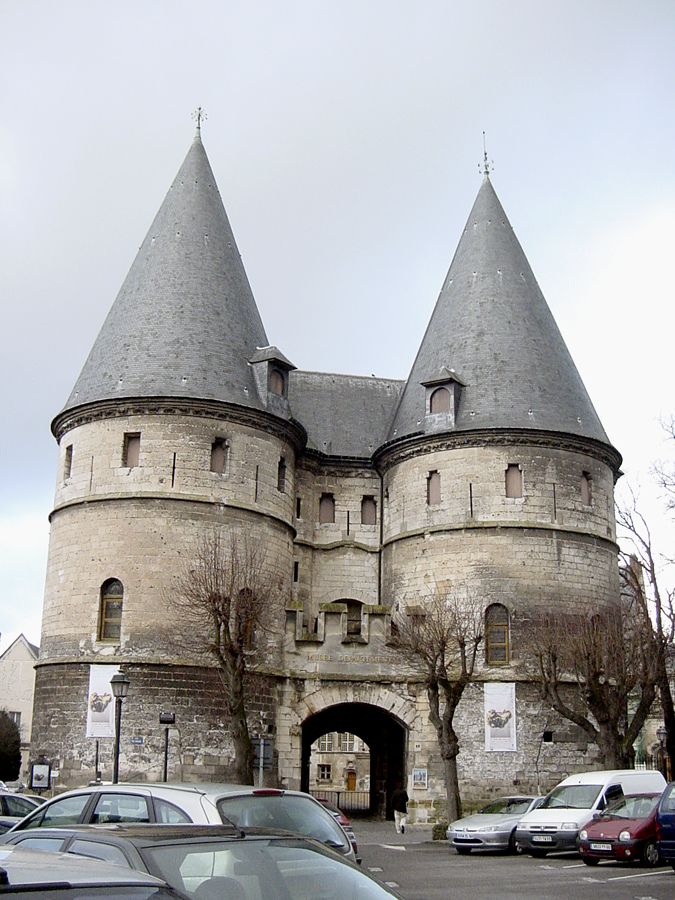 Palais épiscopal de Beauvais (musée départemental de l'Oise)